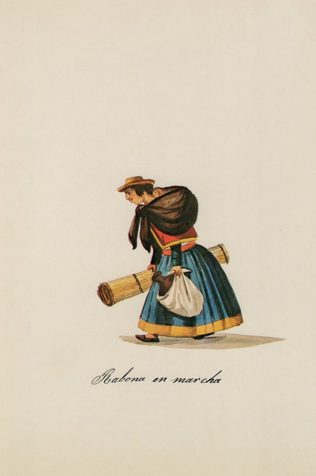 Acuarela de Pancho Fierro (Lima, 1807 - Lima, 1879)